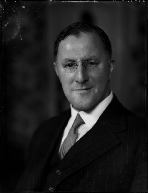 Daniel Lipson